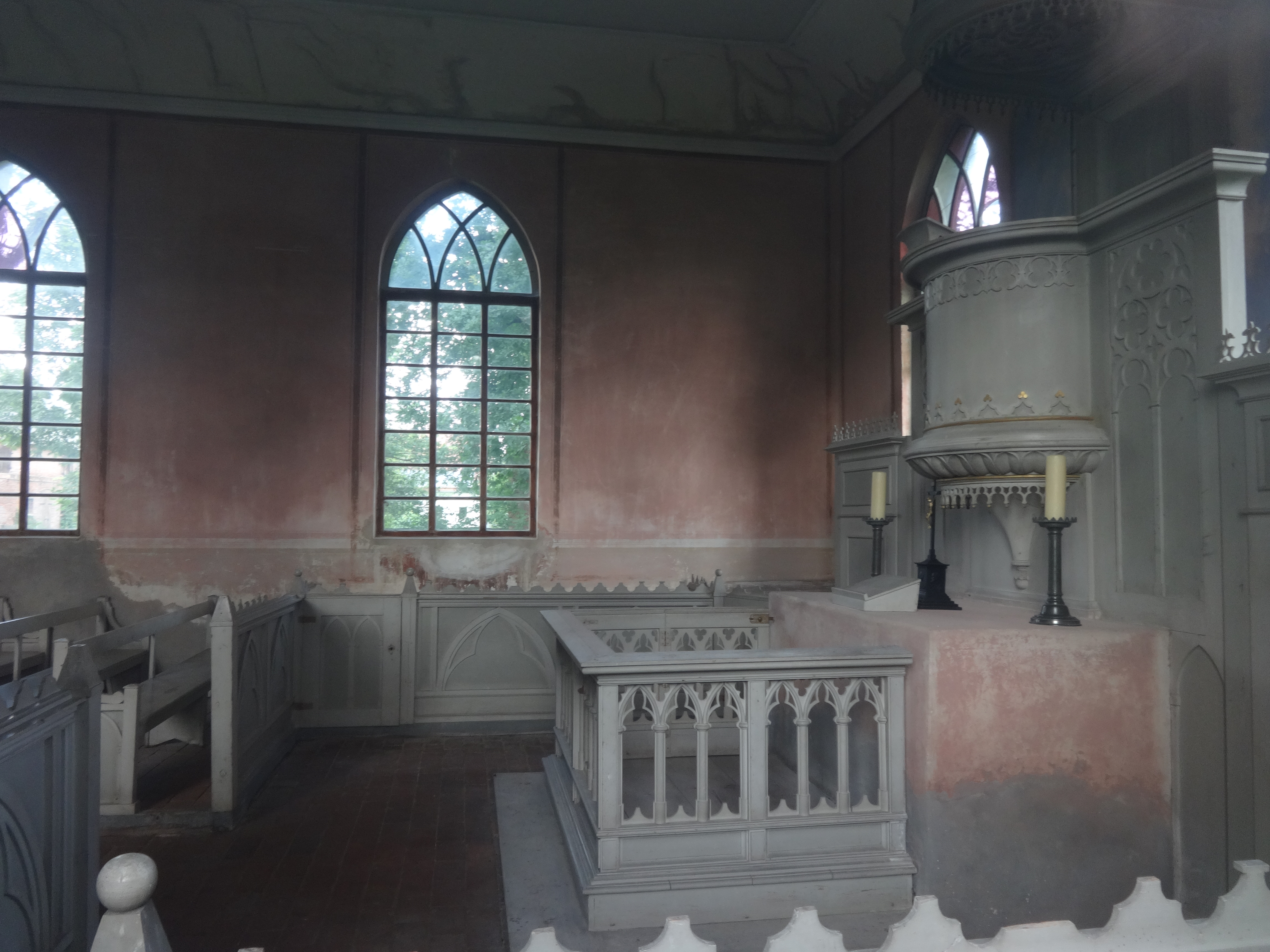 Die Kapelle in Rosenhagen in der Gemeinde Bugewitz entstand vermutlich im 17. Jahrhundert. Im Innern steht eine neugotische Ausstattung mit Kanzelaltar und verglaster Westempore.